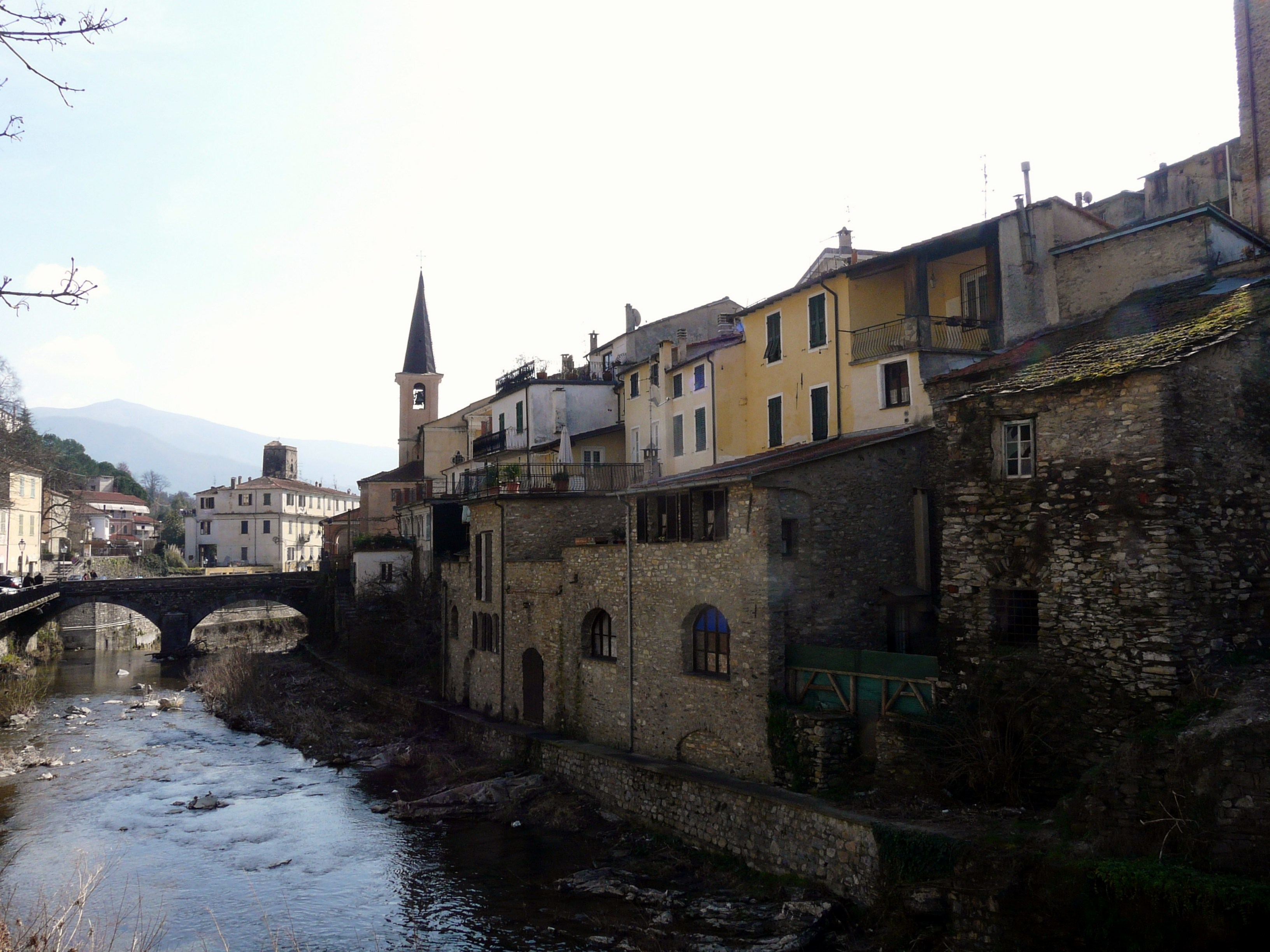 Borgomaro, Liguria, Italia